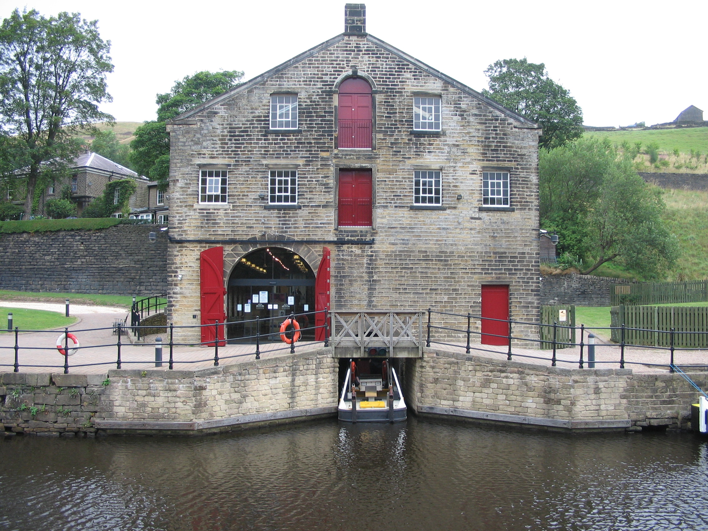 Bezoekerscentrum van de kanaaltunnel op het Huddersfield Narrow Canal - eigen foto - augustus 2006